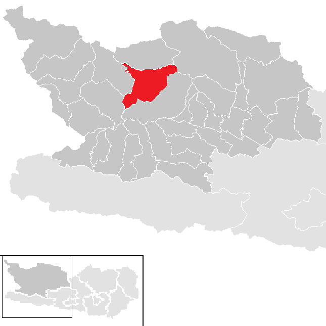 Bezirk Spittal an der Drau